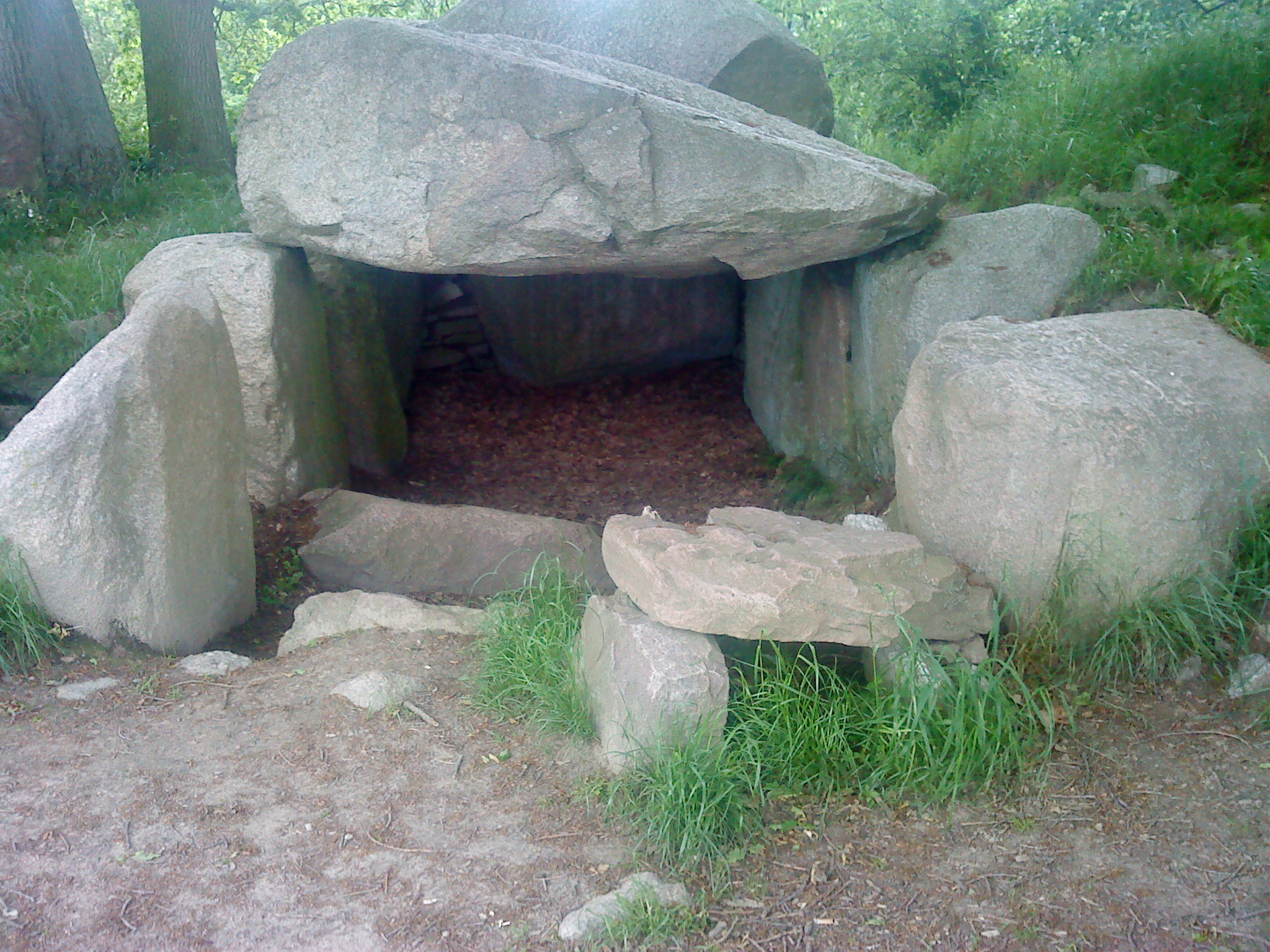 Dolmen1, Lancken-Granitz